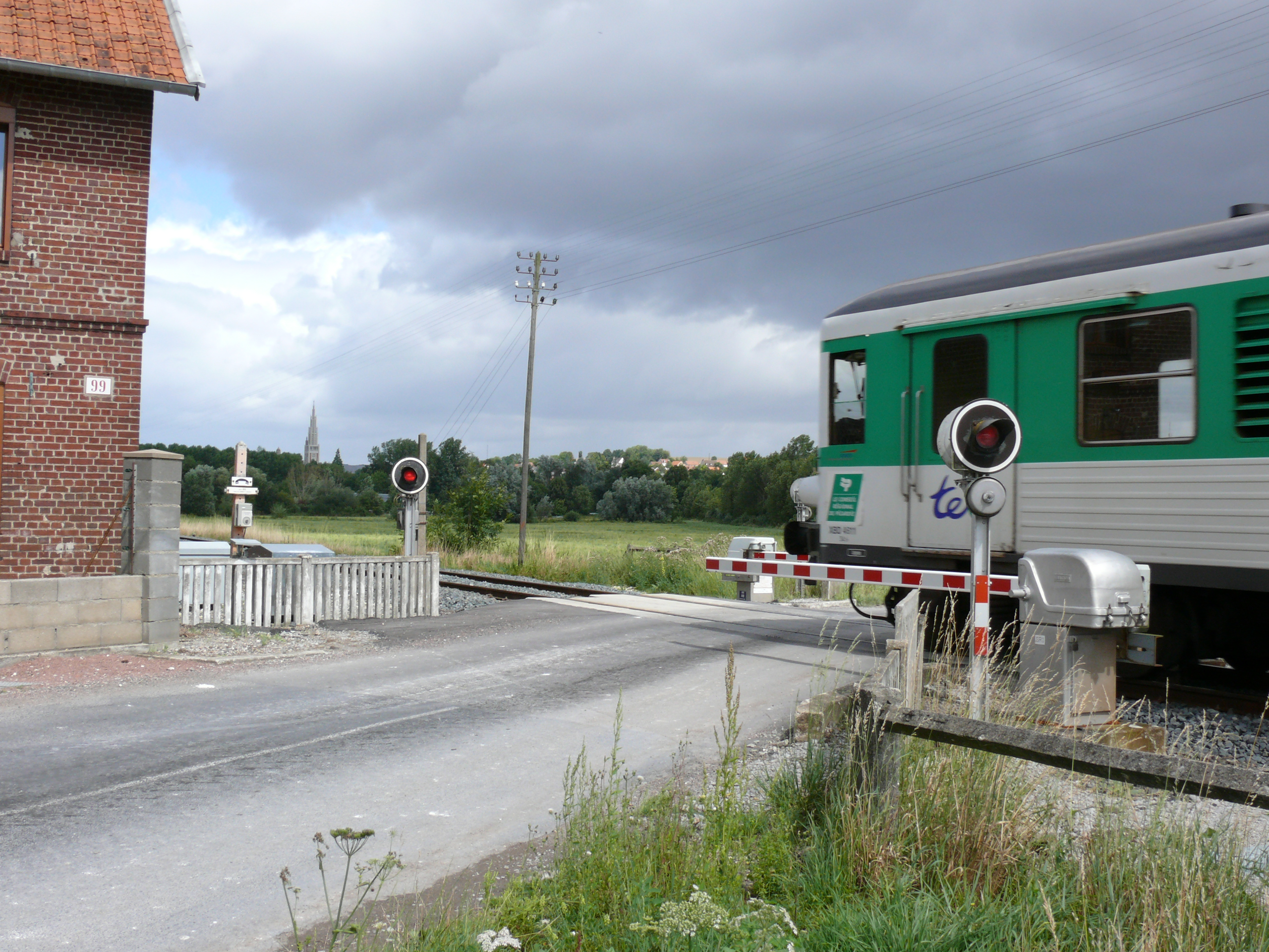 Passage à niveau N°99 de la ligne de train Amiens - Compiègne : Au fond, le clocher de l'église de Moreuil (Somme - Picardie - France)